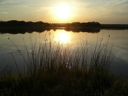 оз.Становое,п.Ильич (Беларусь)